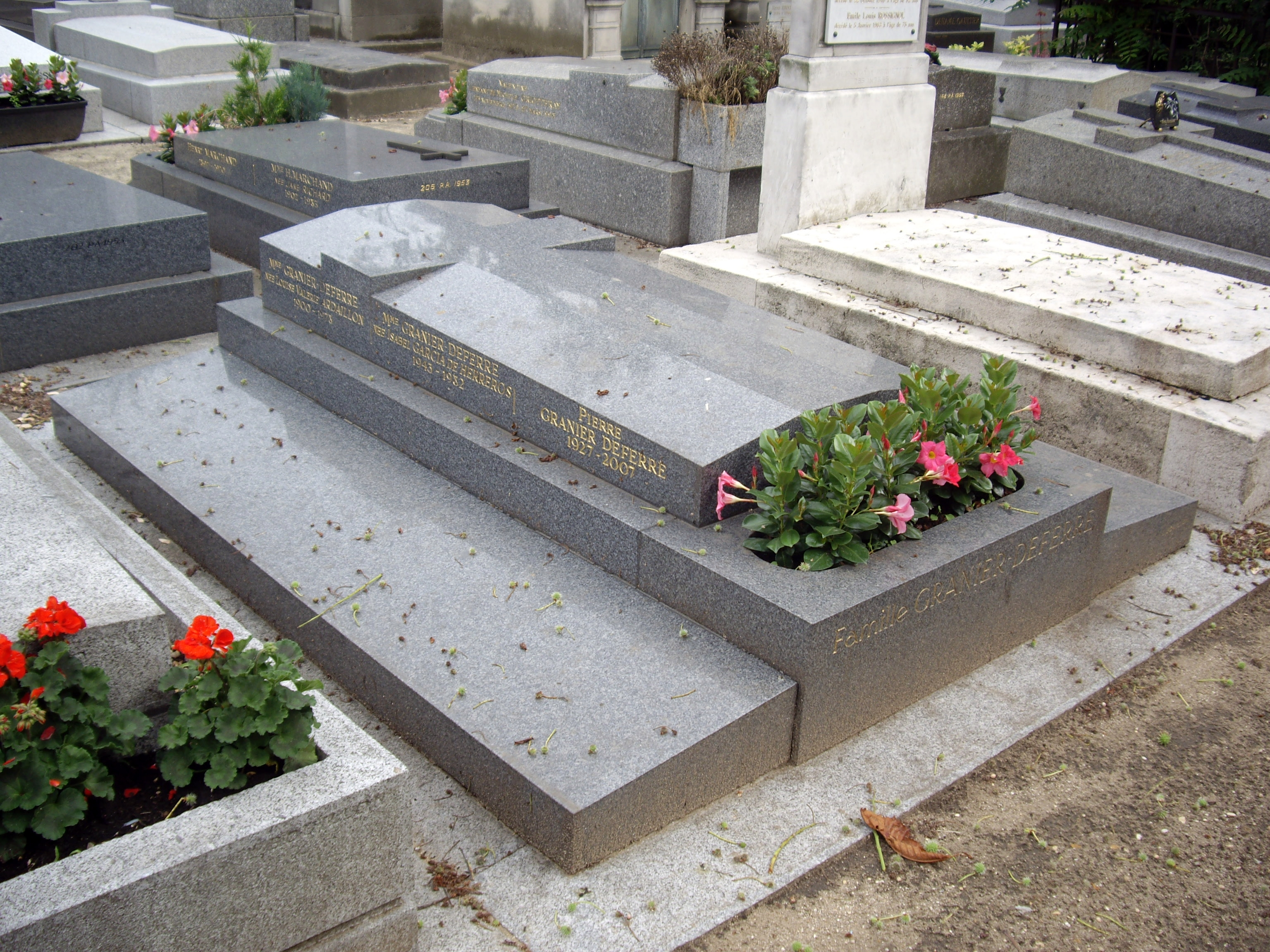 Tombe de Pierre Granier-Deferre, cimetière d'Auteuil, division 5.